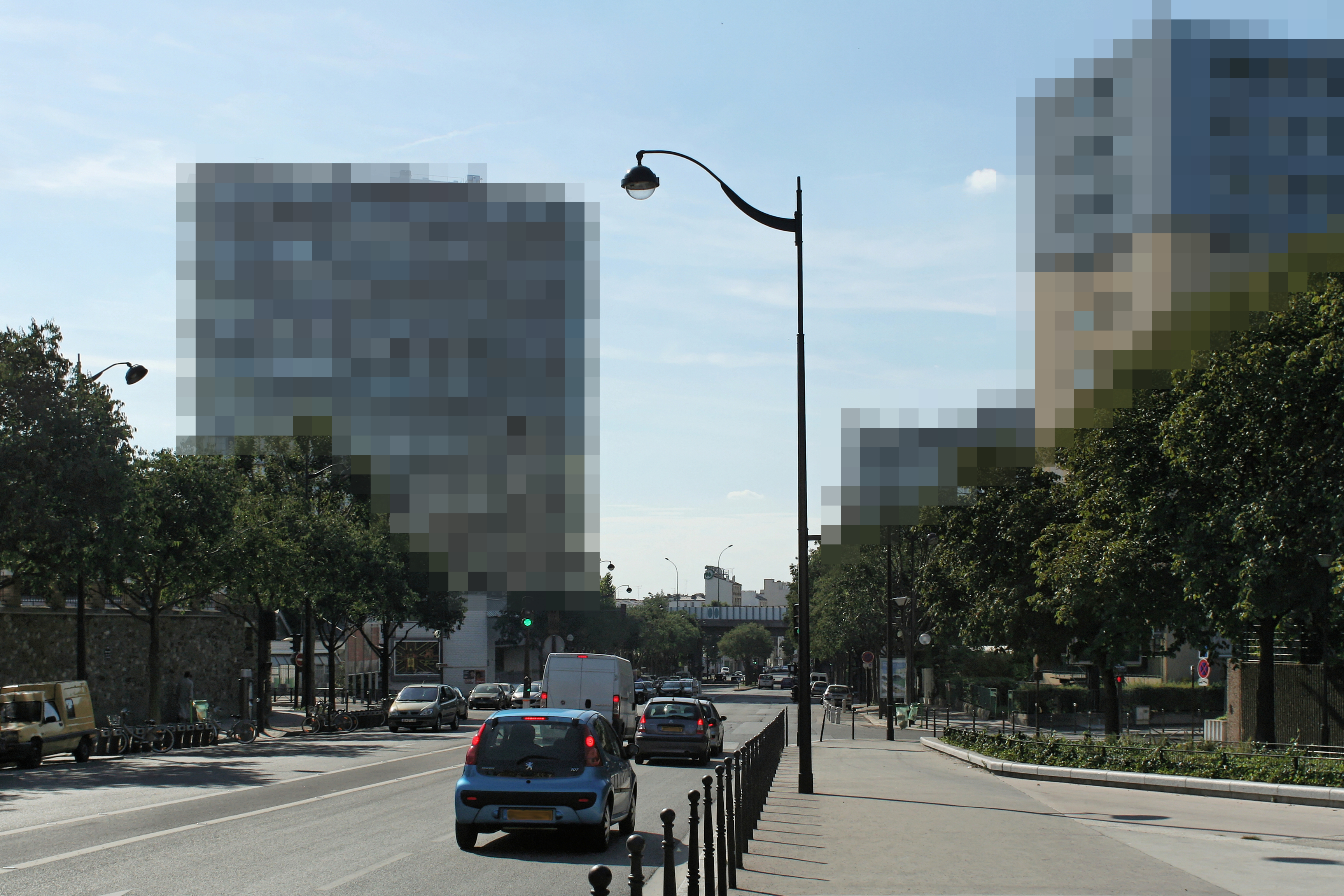 Boulevard du Bois-le-Prêtre, vu depuis la place Arnault-Tzanck.